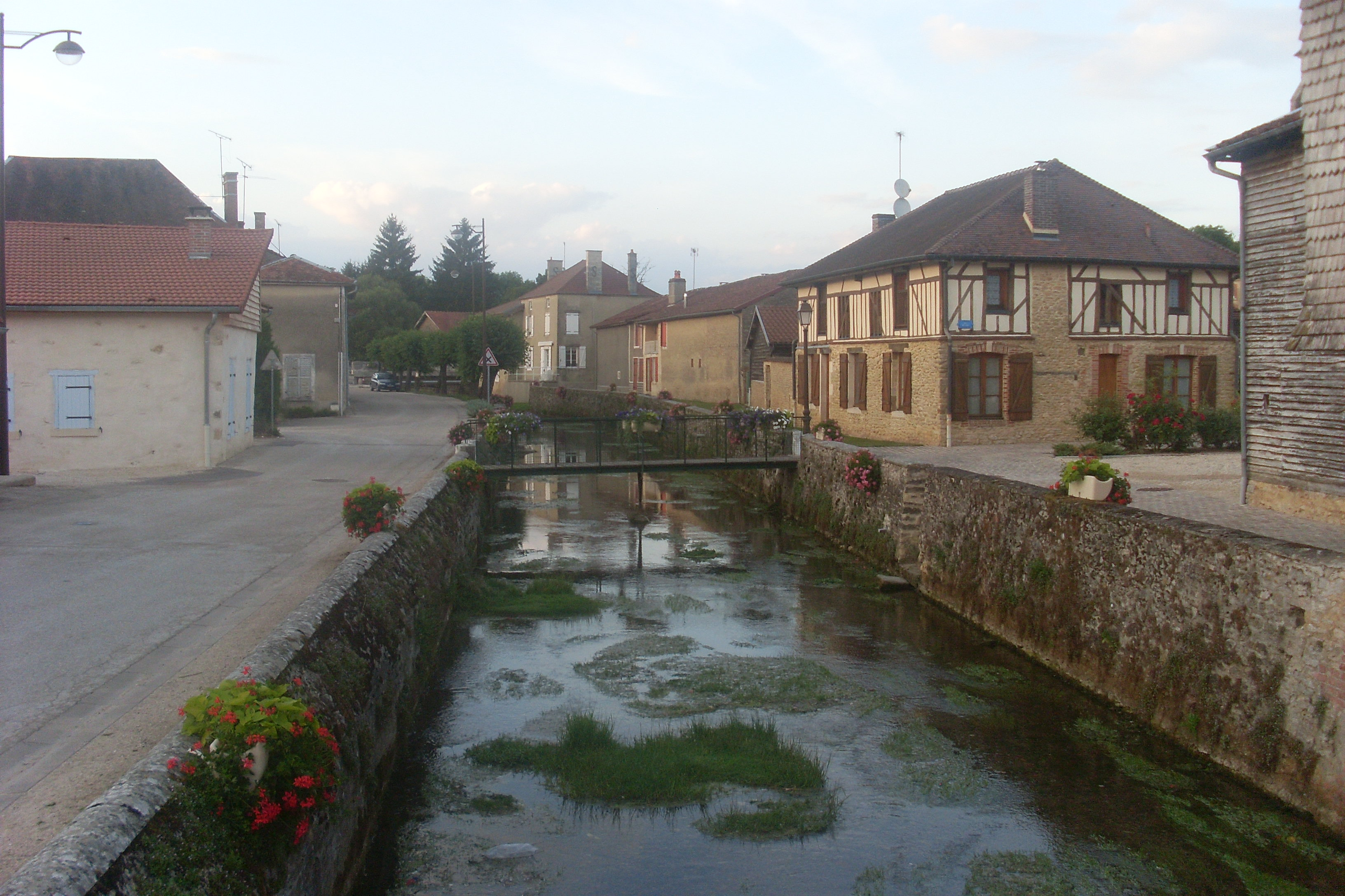 La Laines à Soulaine-Dhuys